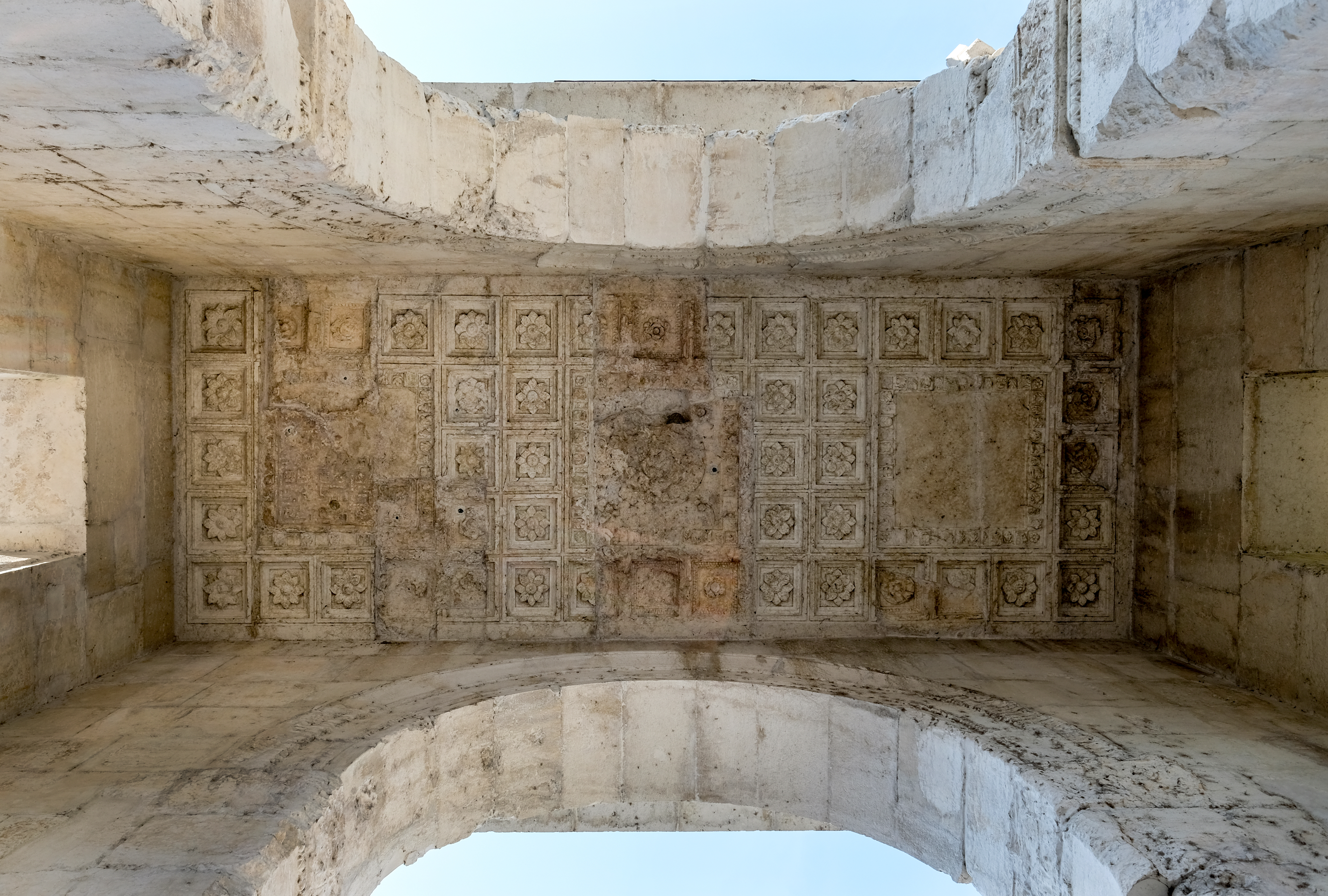 Arco dei Gavi This is a photo of a monument which is part of cultural heritage of Italy.